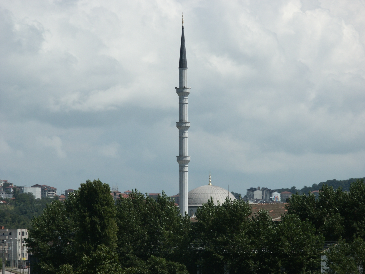 Haci Fevzi Camii